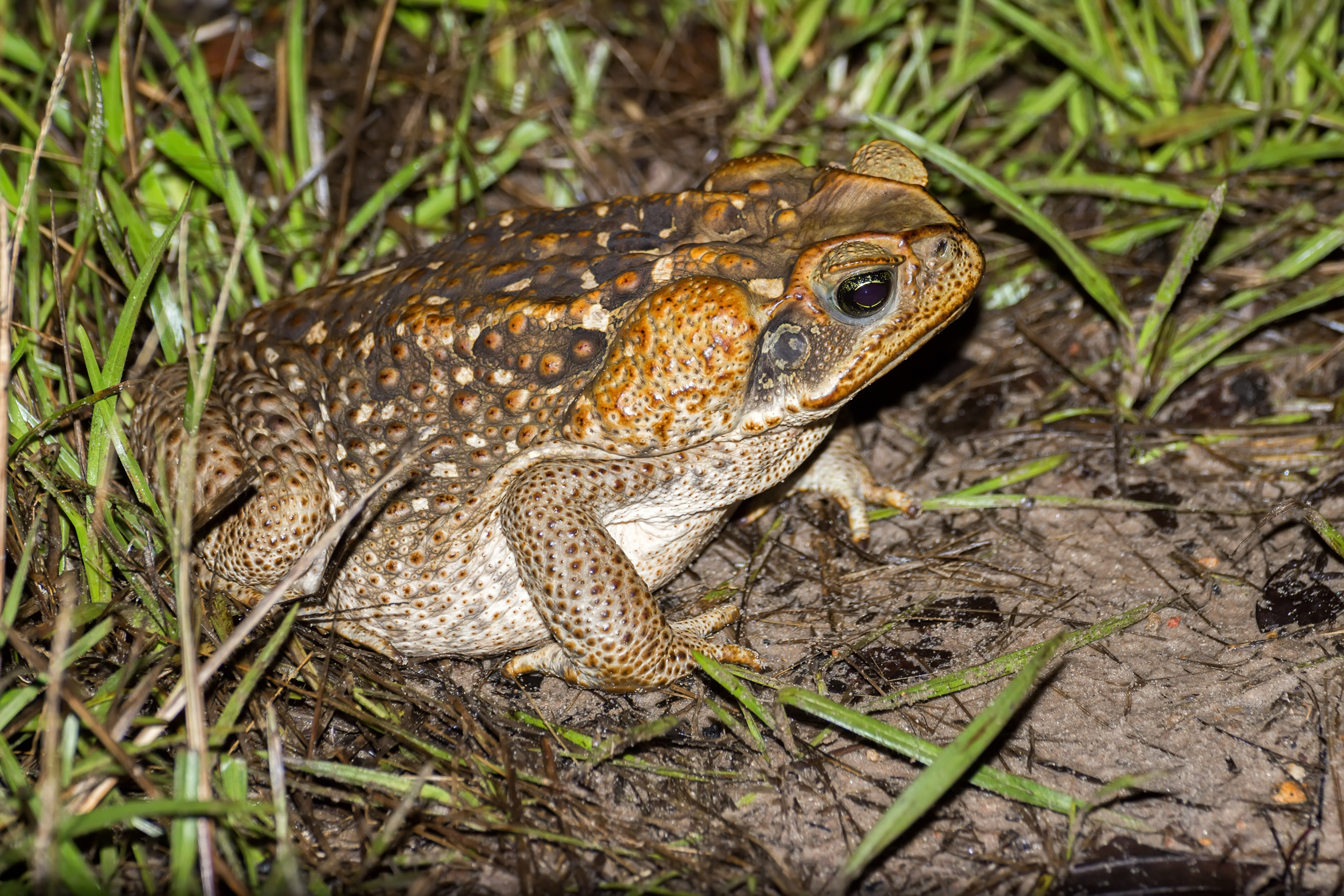 Cane toad | Sapo de caña (Rhinella marina) in Amazonas, Venezuela